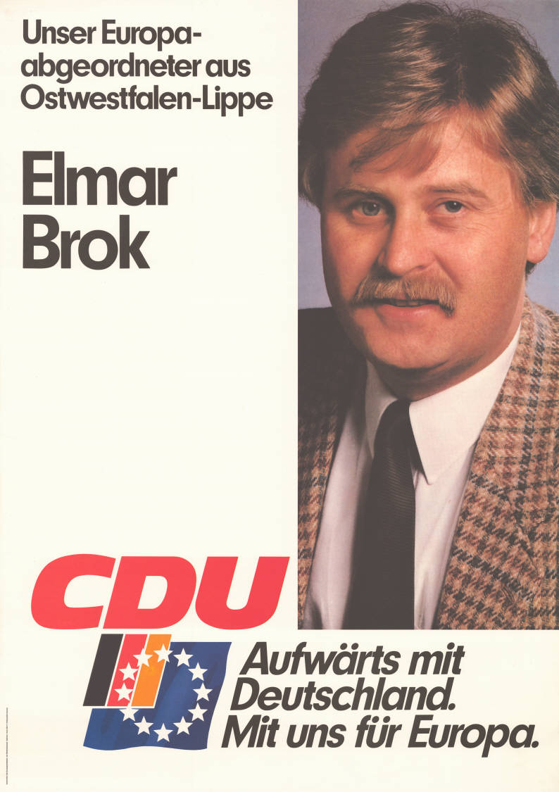 Unser Europaabgeordneter aus Ostwestfalen-Lippe Elmar Brok Porträtfoto CDU Aufwärts mit Deutschland. Mit uns für Europa. Abbildung: Porträtfoto Kommentar: 1 Plakat ist auf der Rückseite mit Filzschreiber beschriftet. Plakatart: Kandidaten-/Personenplakat mit Porträt Auftraggeber: CDU-Bundesgeschäftsstelle, Abt. Öffentlichkeitsarbeit, Bonn Drucker_Druckart_Druckort: Willy F.P. Fehling GmbH, Hannover Objekt-Signatur: 10-030 : 148 Bestand: Europawahlplakate (10-030) GliederungBestand10-18: Europawahlplakate (10-030) » Europawahl am 17.6.1984 » CDU Lizenz: KAS/ACDP 10-030 : 148 CC-BY-SA 3.0 DE